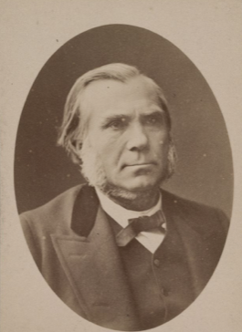 Bernard Roudier juriste